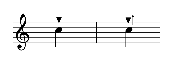 Handbell martellato and martellato lift notation